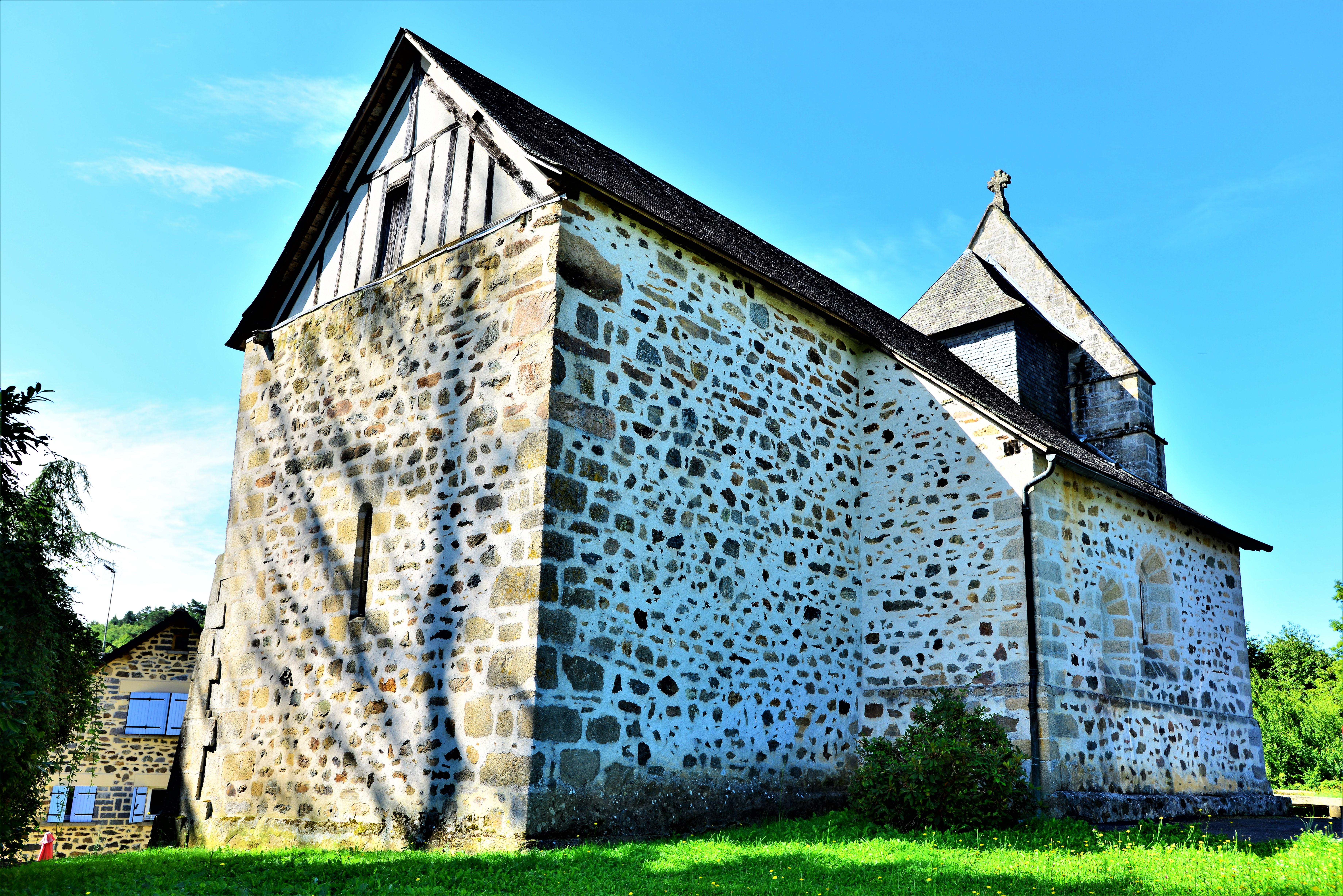 L'église de Ladignac-sur-Rondelles, Corrèze,France.